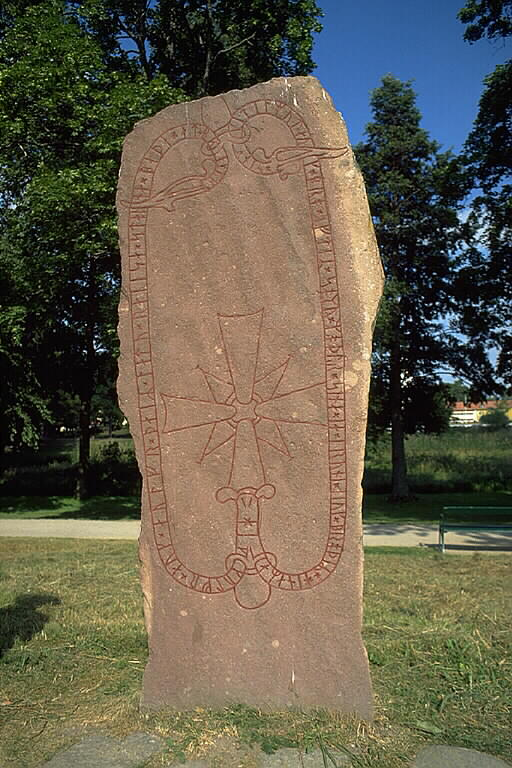 Hälgulv och Öulv, de lät resa båda stenarna efter sin broder Kättilmund och (gjorde) bro efter Soma, sin moder. Men Brune, hennes broder, högg runorna. Motiv: Sö178 Gripsholm Nyckelord: Runor Kategori: Runristning/runsten Hälgulv och Öulv, de lät resa båda stenarna efter sin broder Kättilmund och (gjorde) bro efter Soma, sin moder. Men Brune, hennes broder, högg runorna.